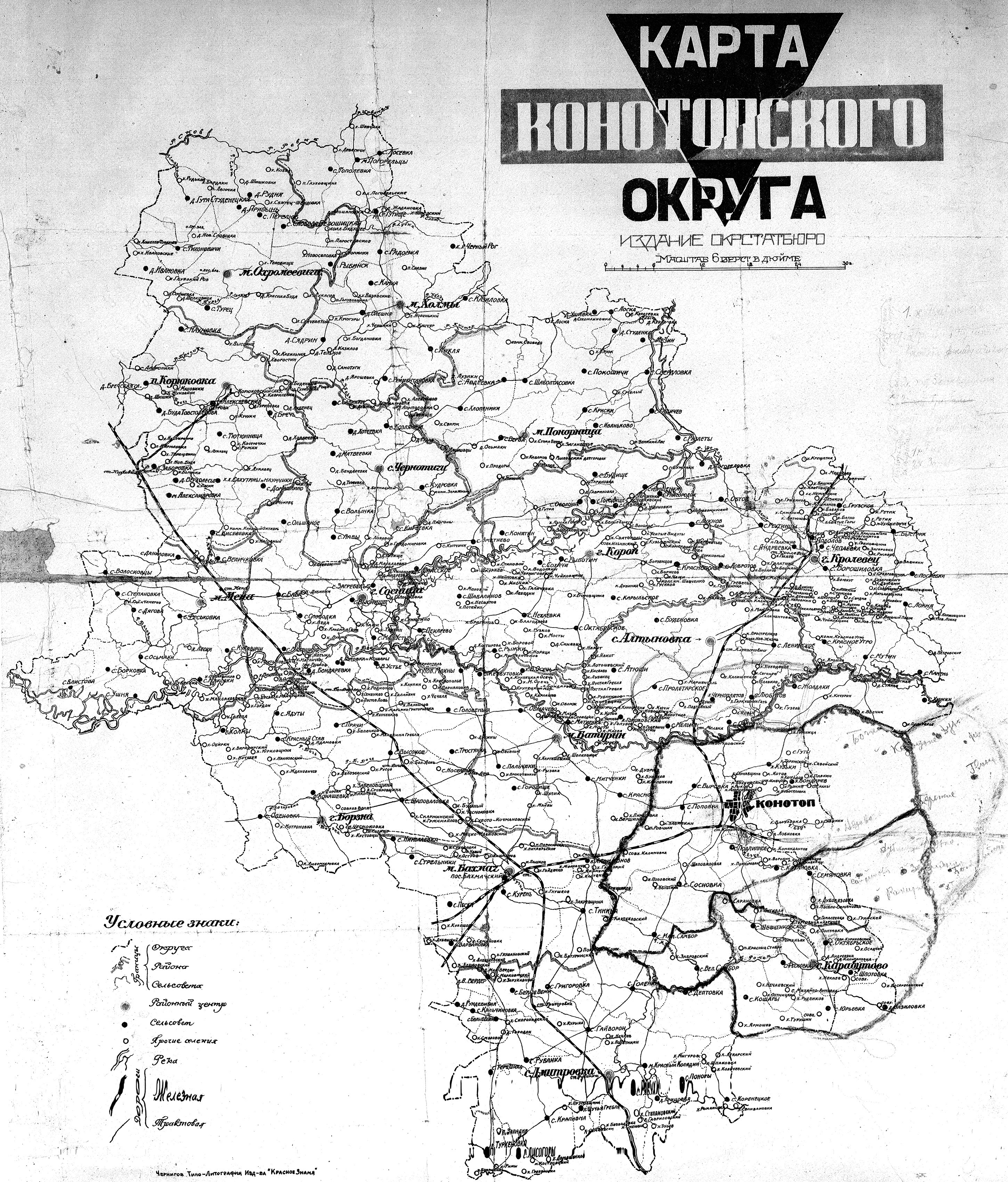 мапа Конотіпської округи